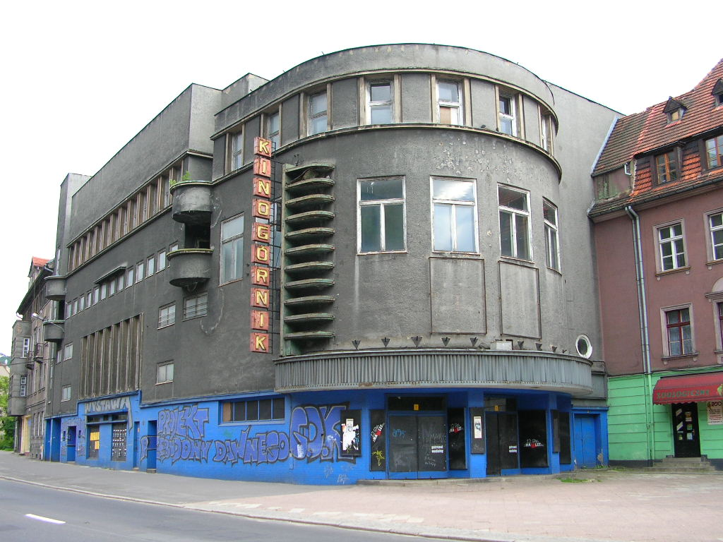 Wałbrzych Aleja Wyzwolenia 23 - pierwotnie kino "Capitol" i Górniczy Dom kultury, następnie Kino "Górnik", 1927-1928.